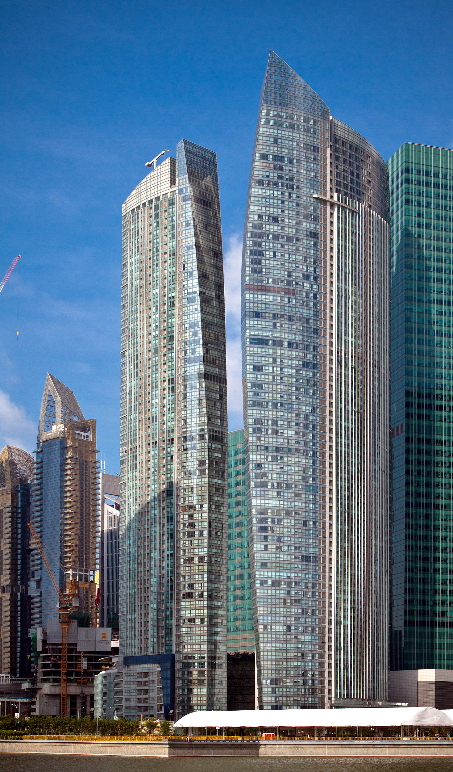 The Sail @ Marina Bay, Singapore